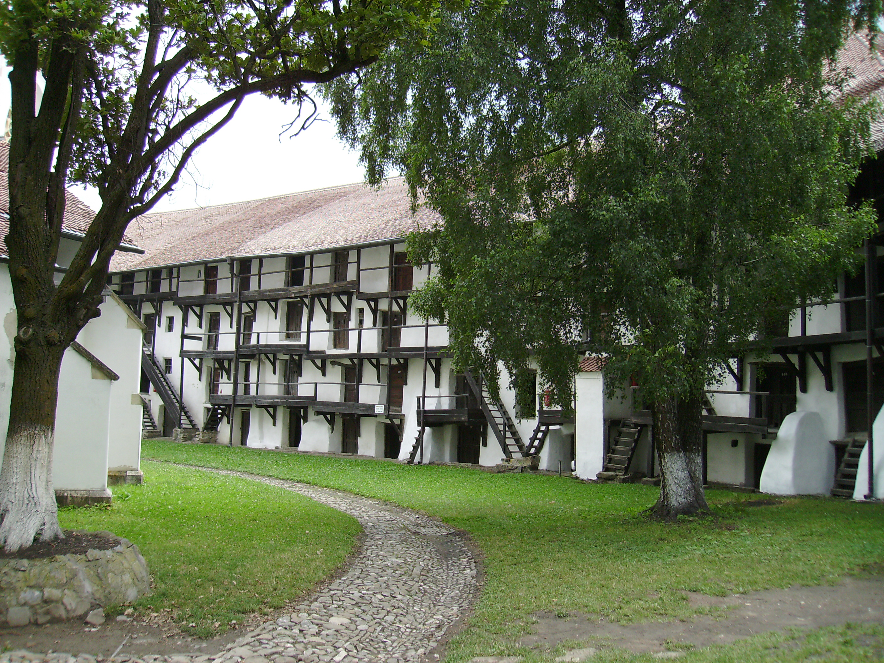 Intérieur de la fortification de Prejmer. L'église proprement dite se trouve du côté gauche de l'image, on en voit deux de ses contreforts.